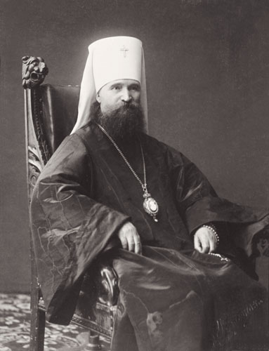 Митрополит Владимир (Богоявленский)